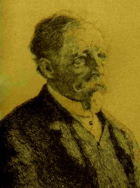 Eugène Cicéri (1813-1890) - peintre et graveur, portrait gravé par Loÿs Delteil, paru dans L'Artiste en 1891.